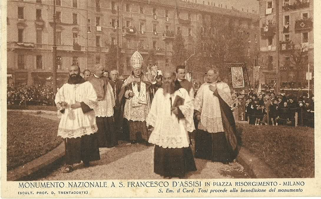 Sua Em.Card. Tosi inaugura la statua di San Francesco